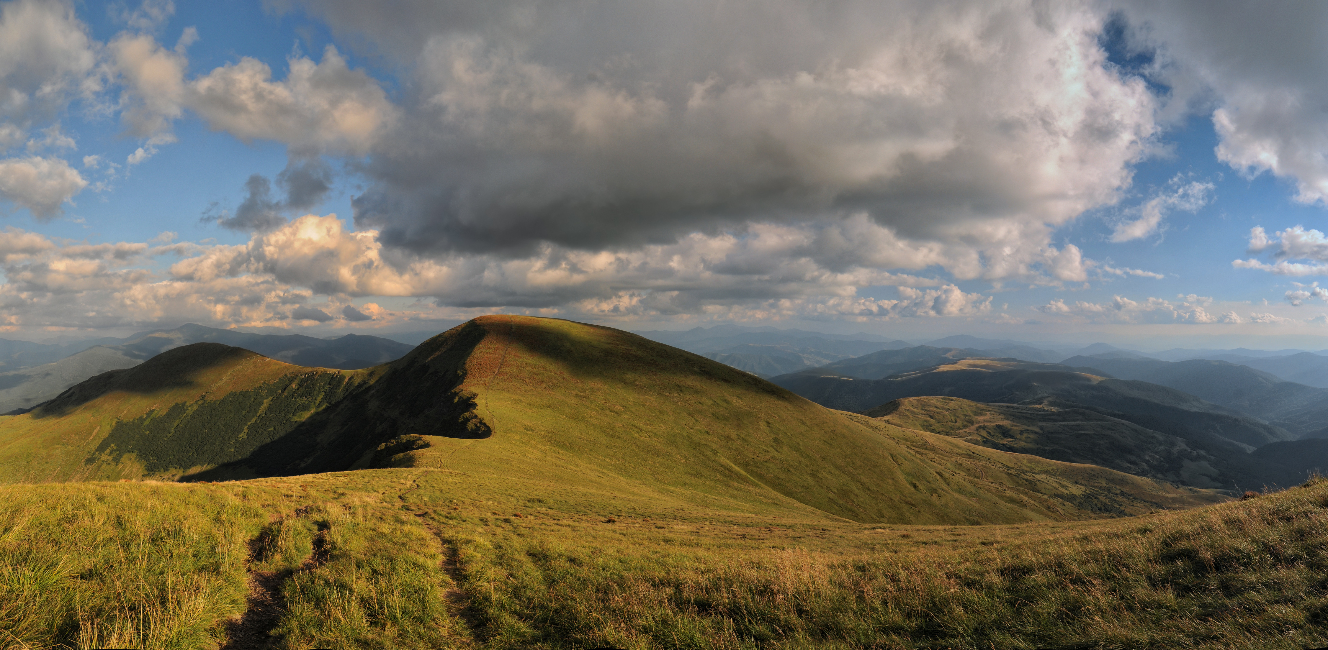 гори Близниці